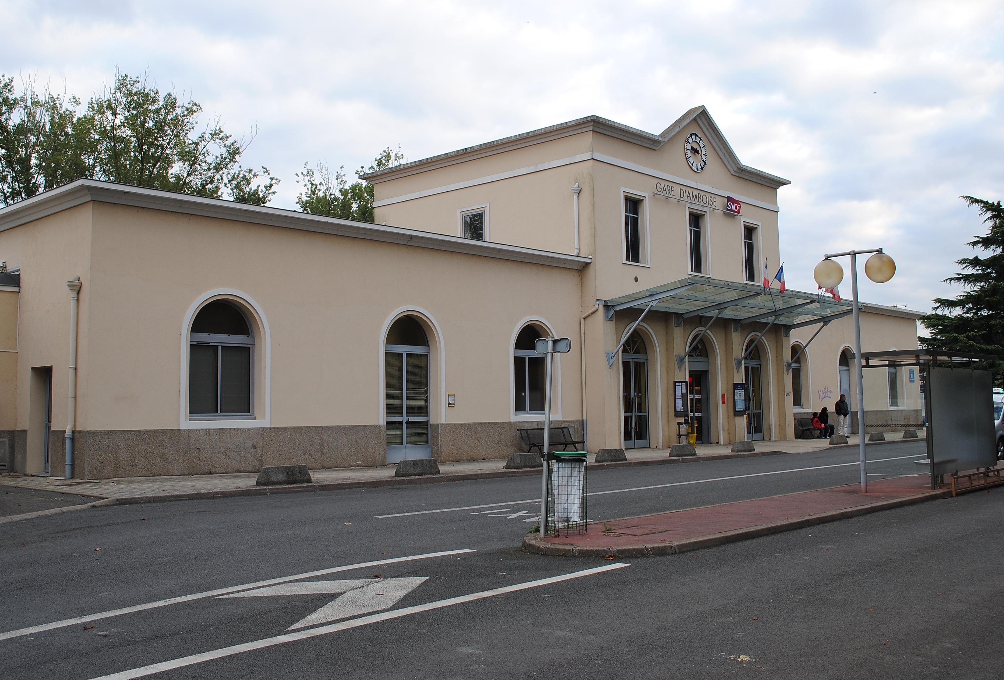 Gare d'Amboise